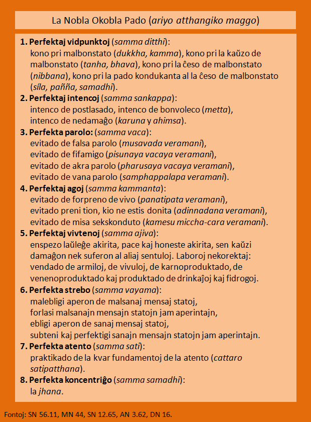 La Nobla Okobla Pado lernigita de Budho.